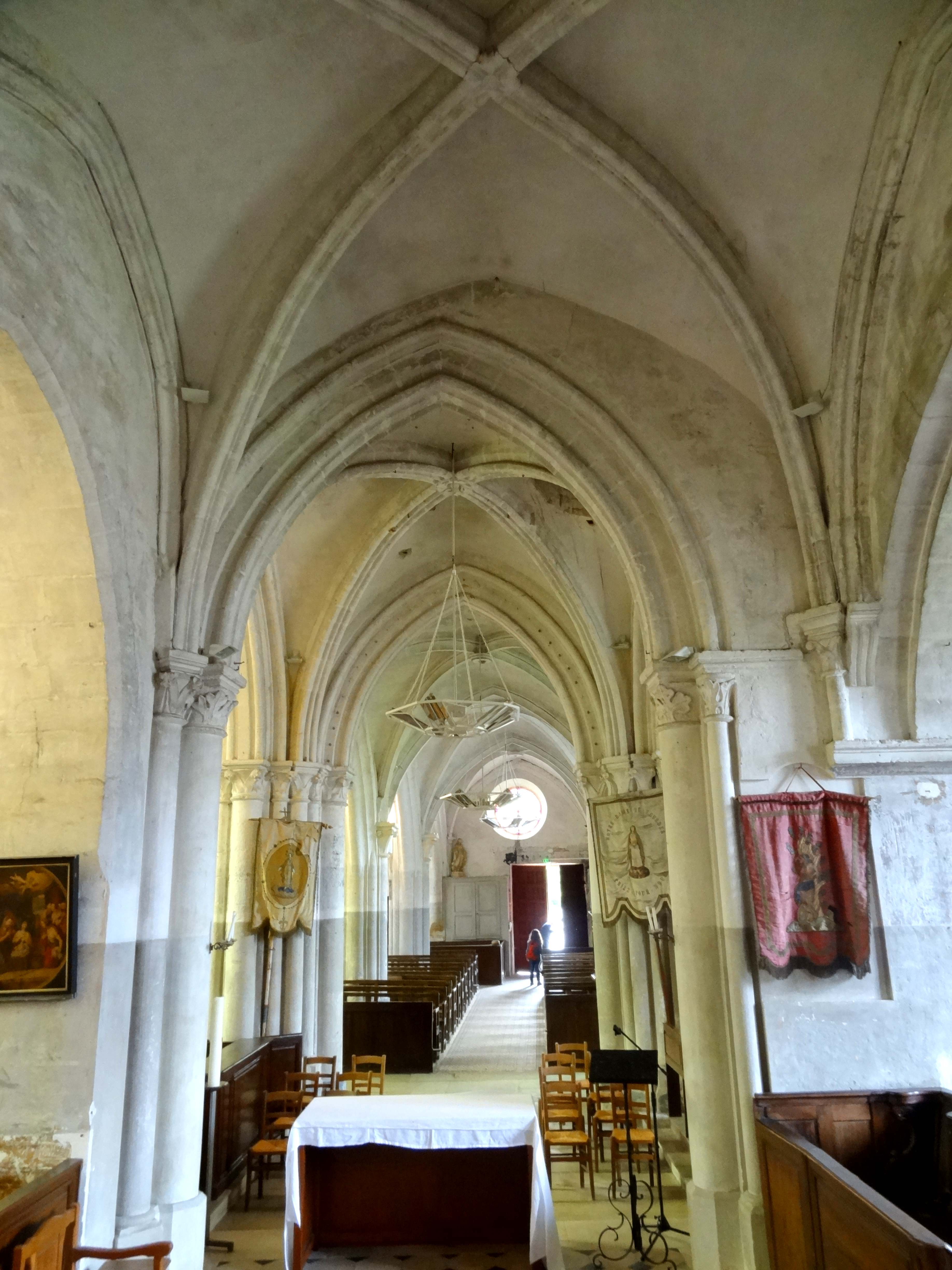 Intérieur de l'église - voir titre.